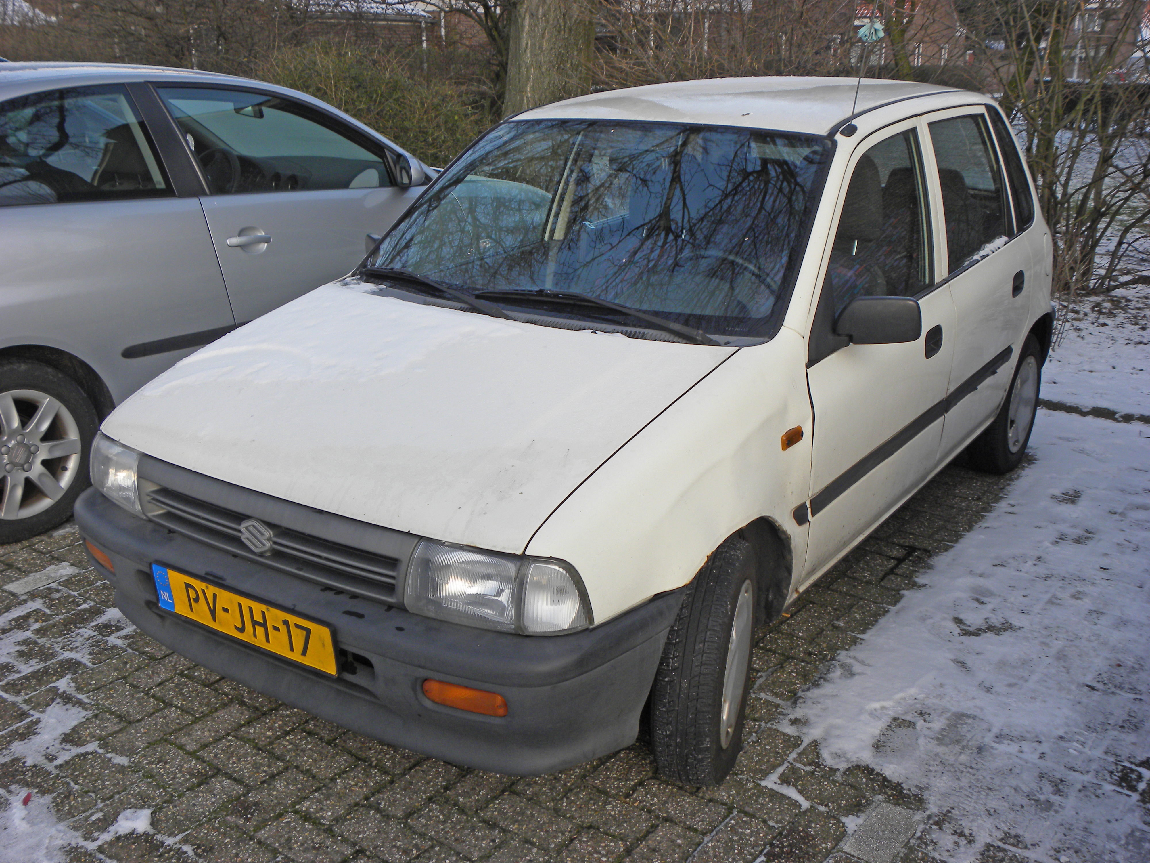 1996 Suzuki Alto